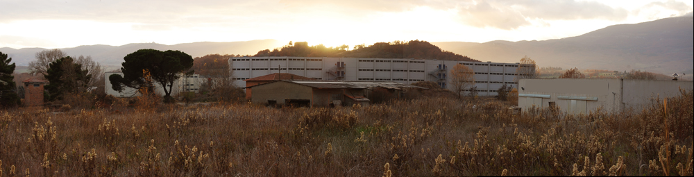 Panorama della Fornace Frazzi - Stato di fatto. Dello stabilimento oggi rimangono la cabina elettrica e l'edificio che fu degli uffici. Sullo spazio adibito a stoccaggio merci oggi sono stati costruiti alcuni capannoni industriali. Sullo sfondo il monte Cetona.